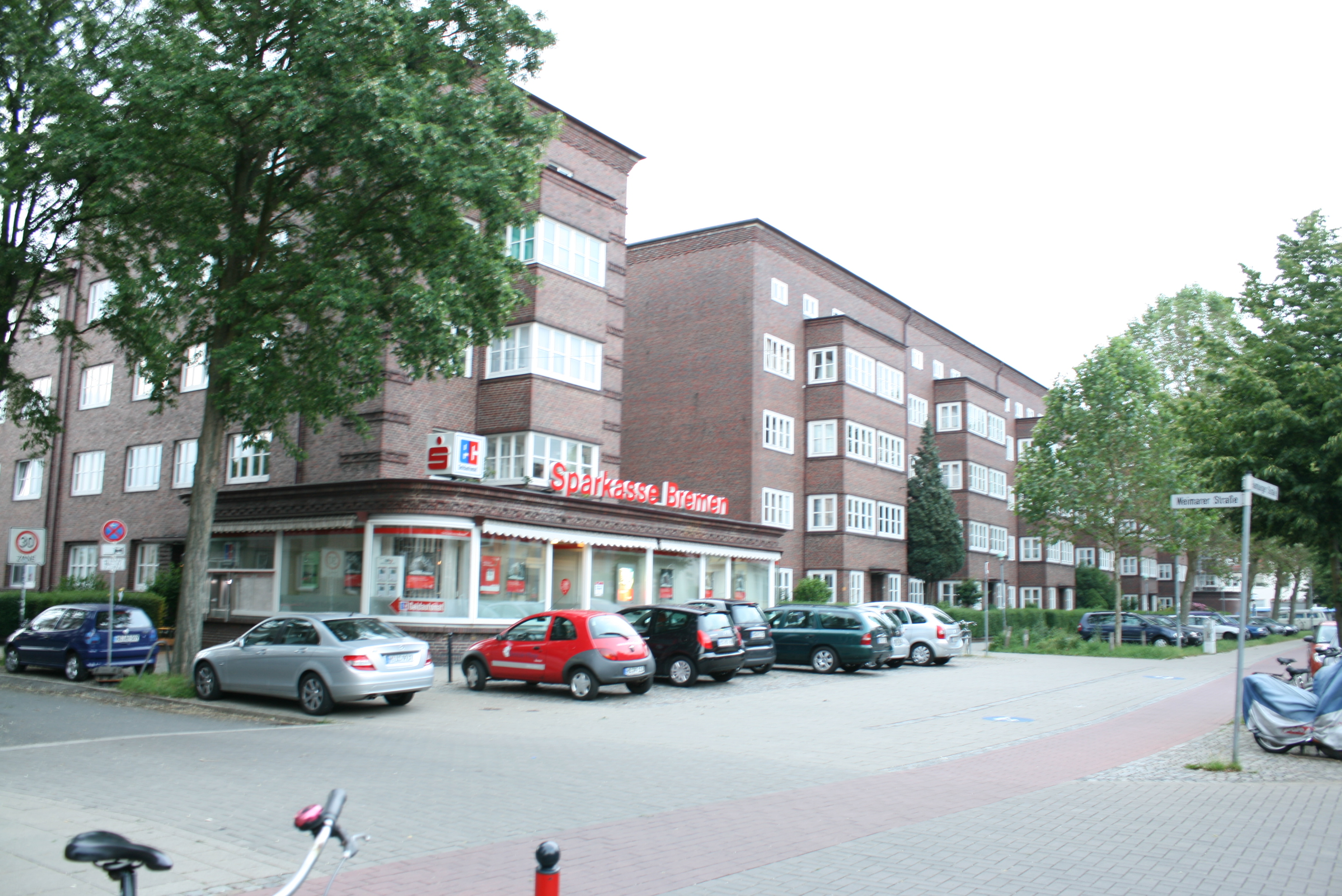 Wohnanlage des Beamten-Wohnungsvereins, Hamburger Straße 222/224, D-28205 Bremen. Entworfen im Jahr 1929 von Heinz Stoffregen